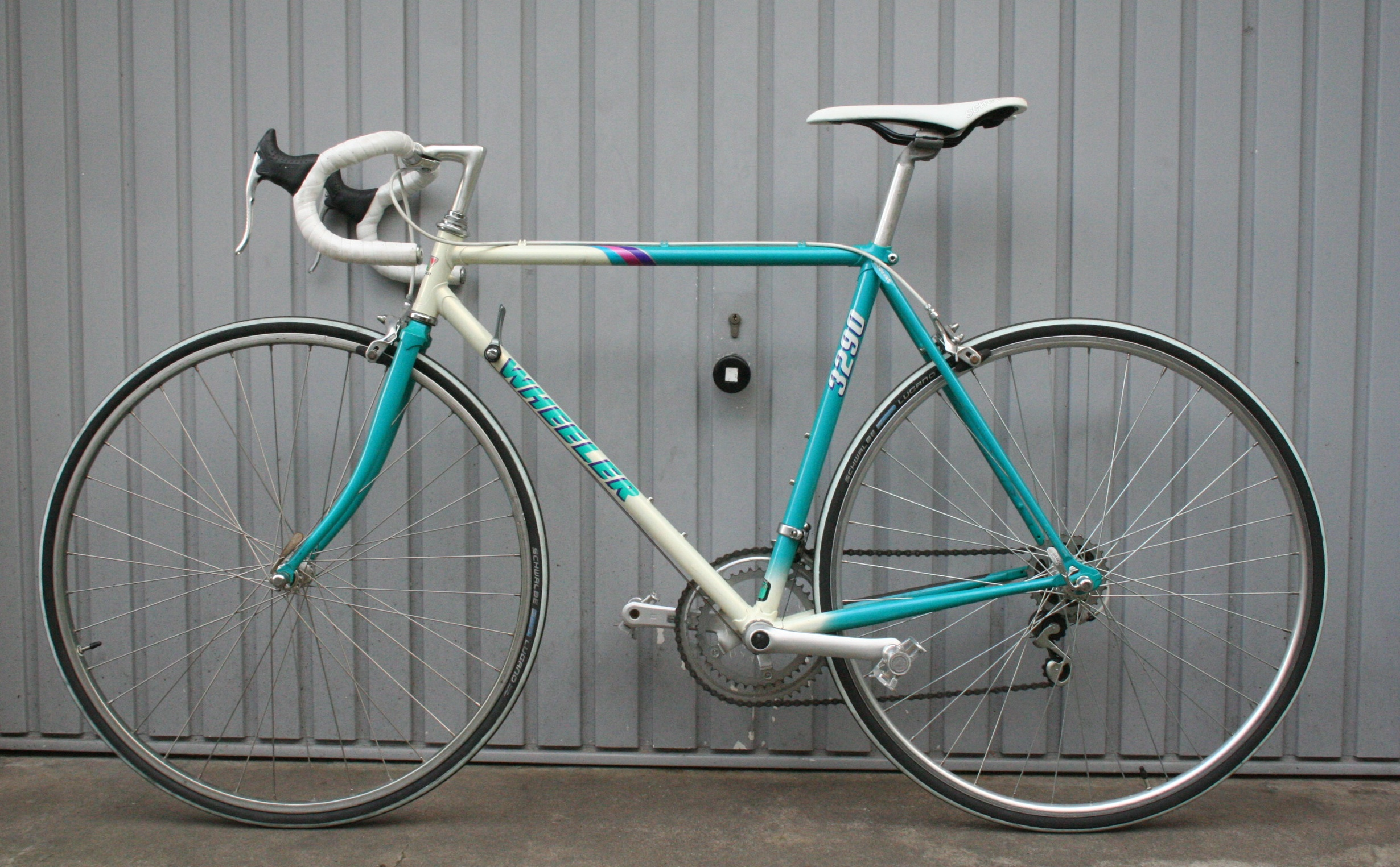 Wheeler Roadbike